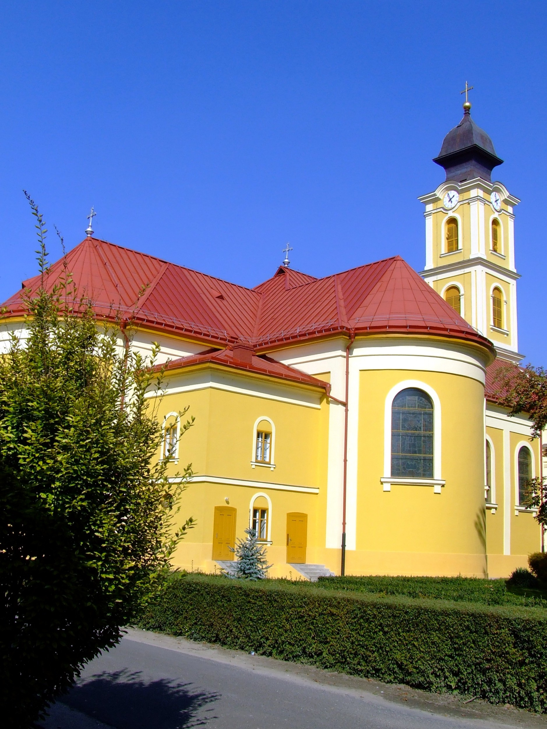 A bácsalmási Szent Kereszt templom. Épült 1821-ben klasszicista stílusban, 1905-ben átépítették.